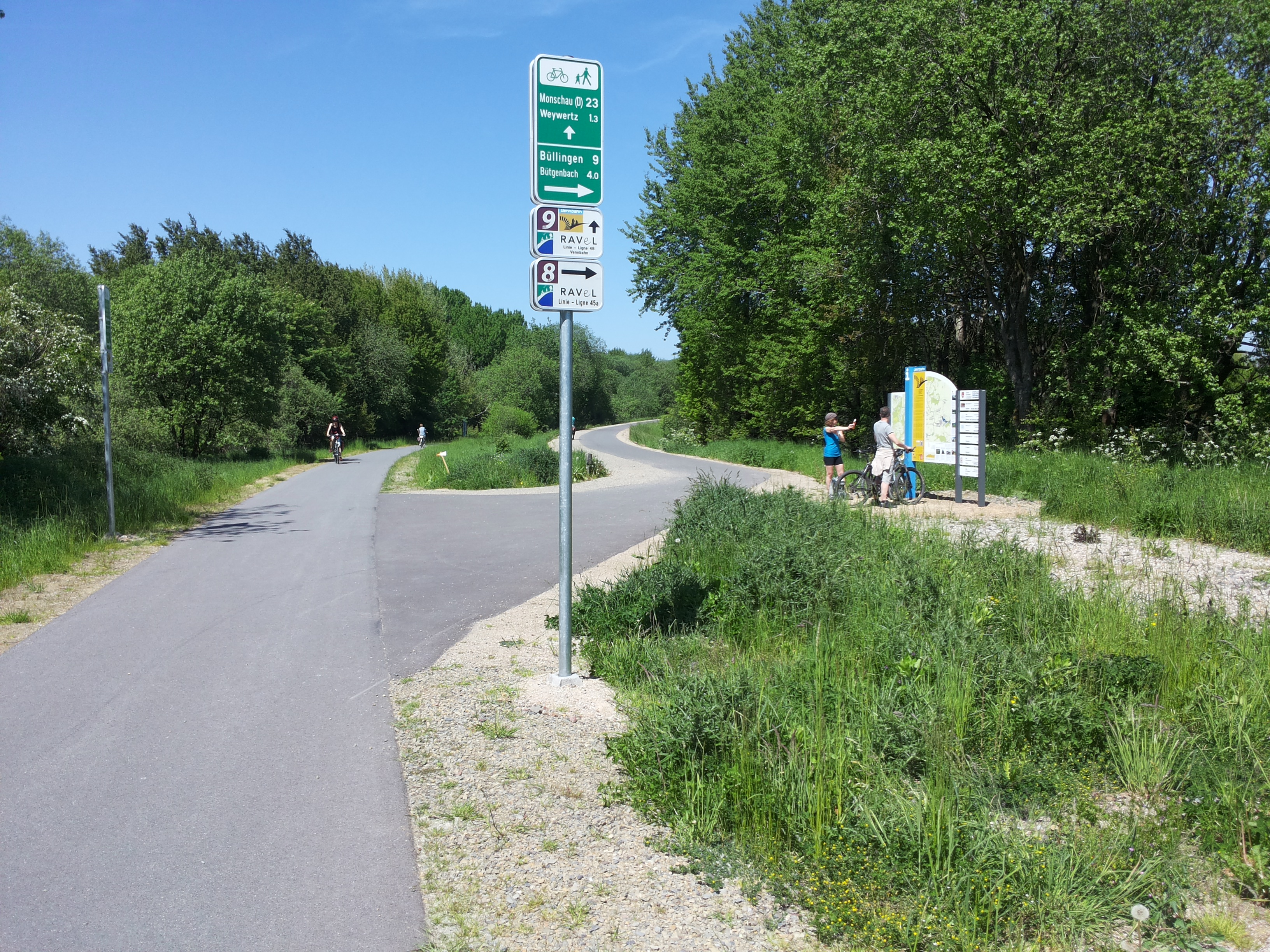 Optimale Beschilderung in Weywertz zur L.45a nach Losheim